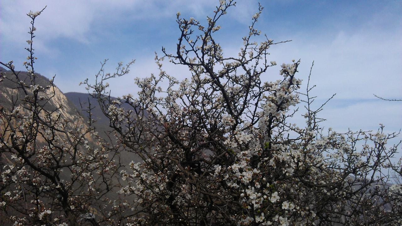 روستای کدیر-بهزاد گروسیان